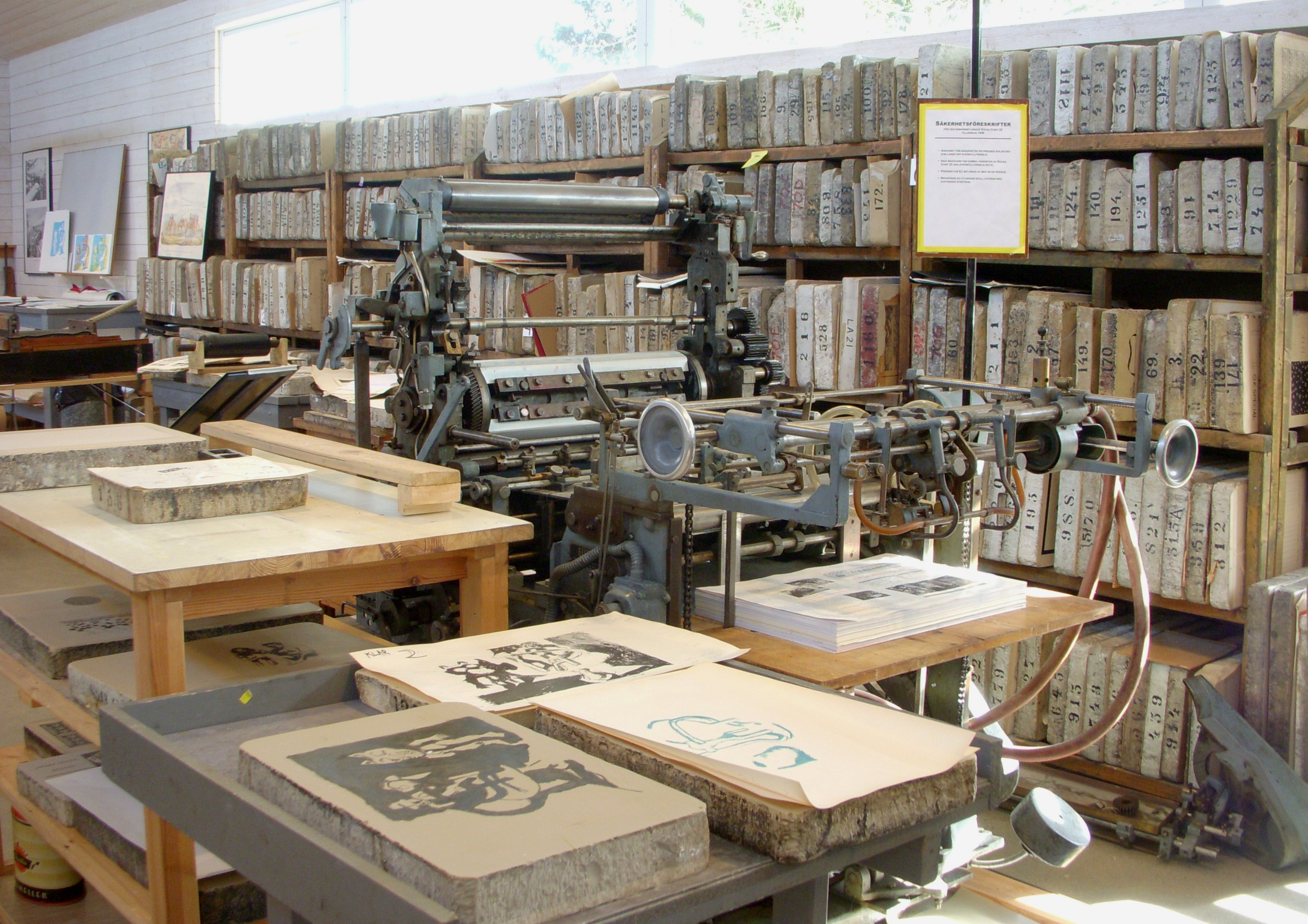 Litografiska museet vid Sundby gård i Huddinge kommun, en svensktillverkad "Solna Chief 22 S/n 17" från 1946.